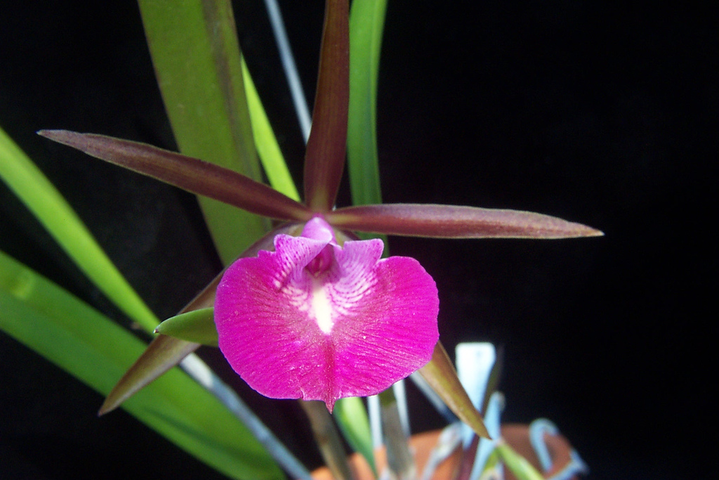 = Brassocattleya, (Brassavola nodosa × Cattleya Batalinii) where C. Batalinii = C. bicolor x C. intermedia